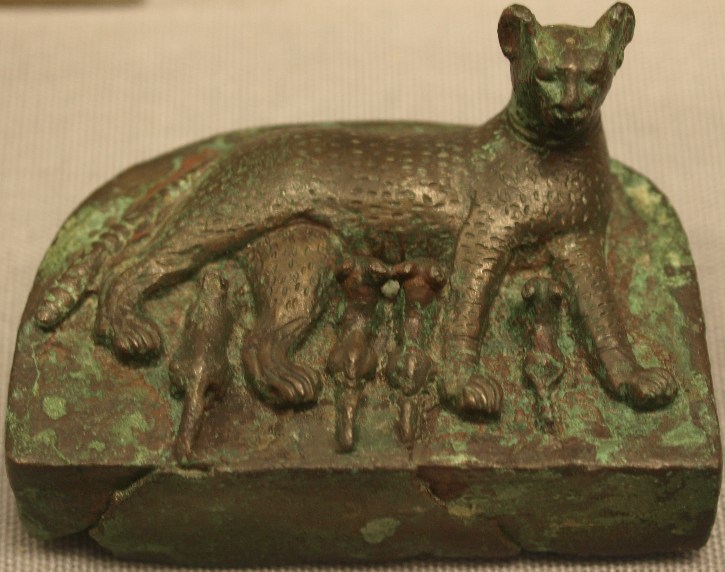 Bastet nursing kittens